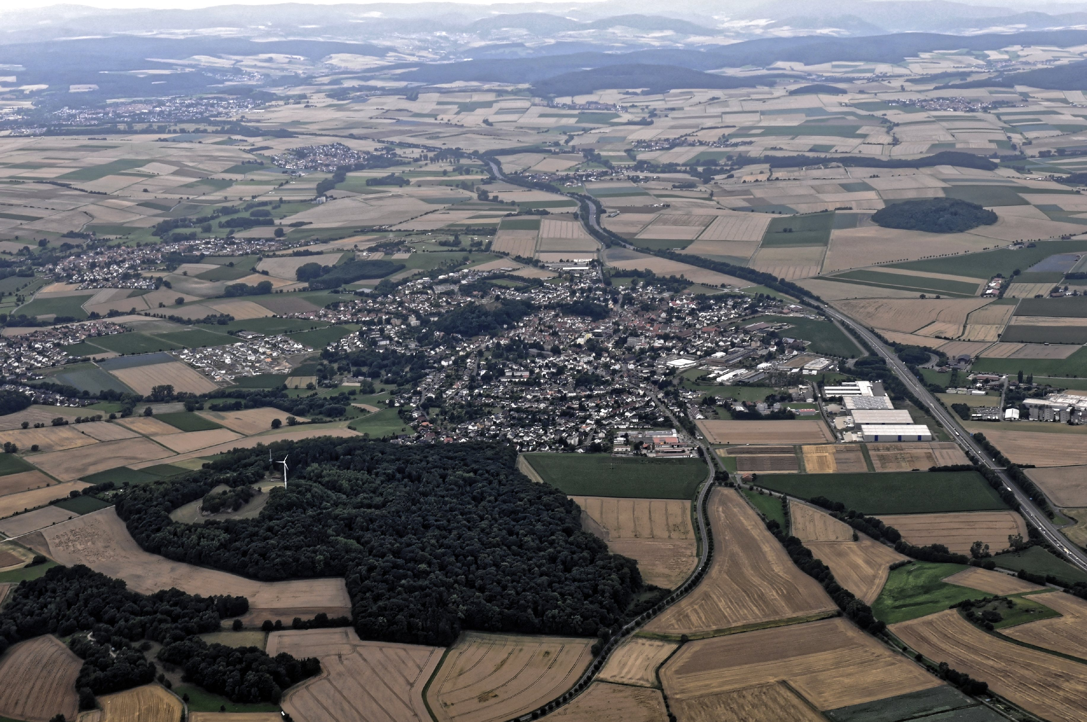 Bilder vom Flug Nordholz-Hammelburg 2015: Blick von Norden auf Gudensberg, Schwalm-Eder-Kreis, Nordhessen.